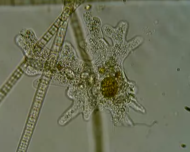 Ameba, probablemente Amoeba proteus